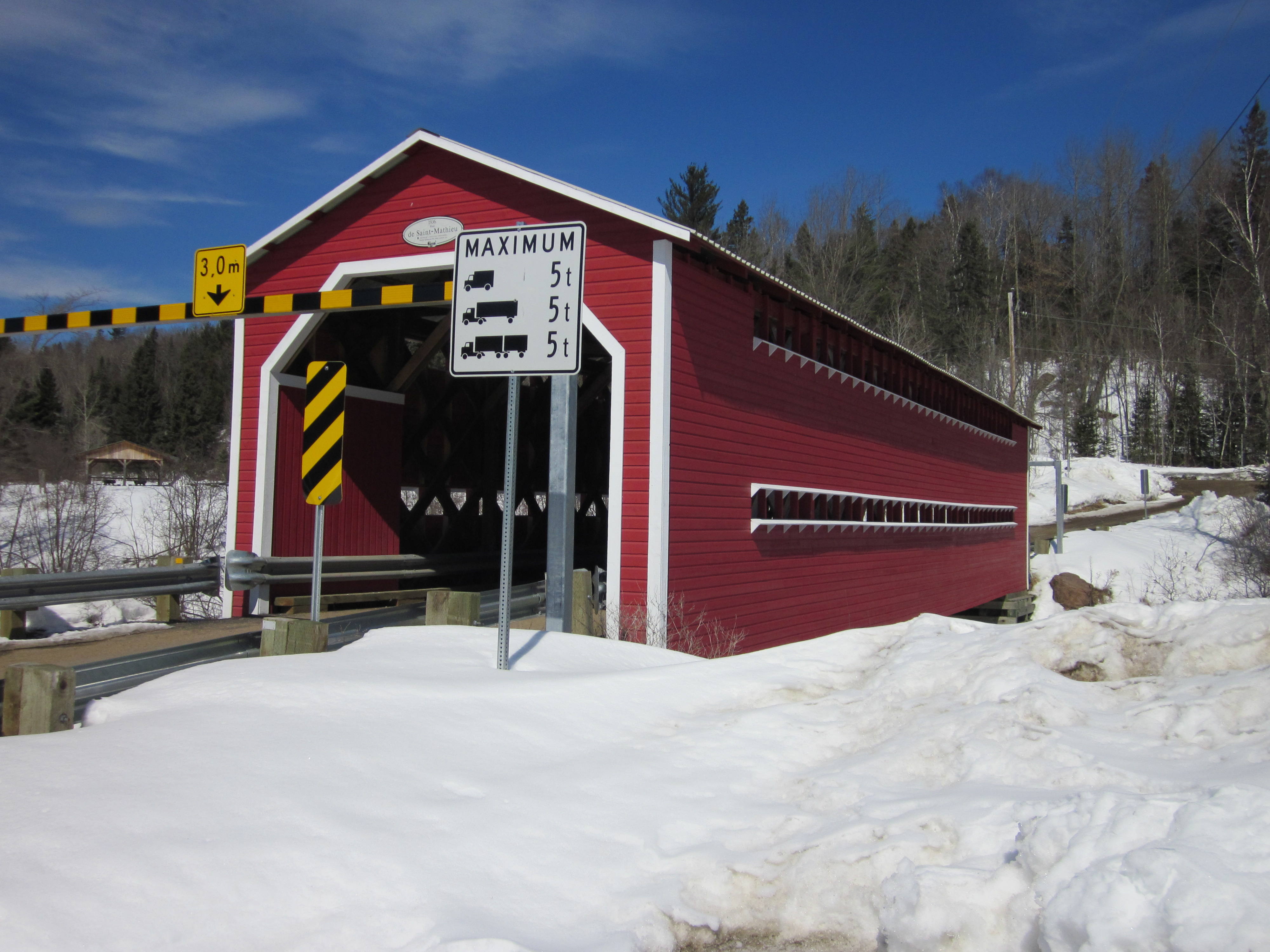 Le pont de Saint-Mathieu à Saint-Mathieu-du-Parc vue de la rive Ouest.